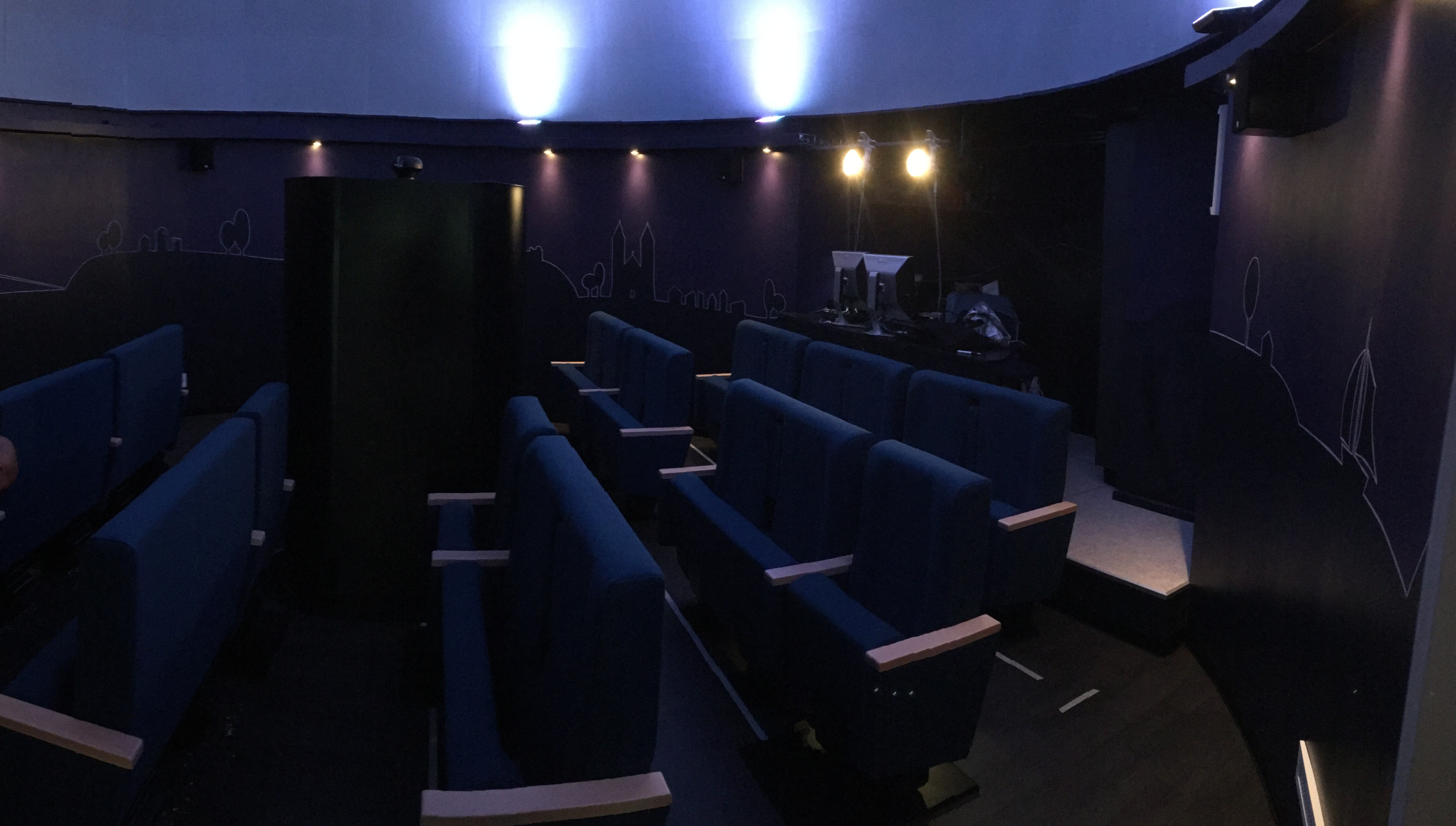 I planetariet kan besökare titta upp på kupolen och se ett datorsimulerad universum.